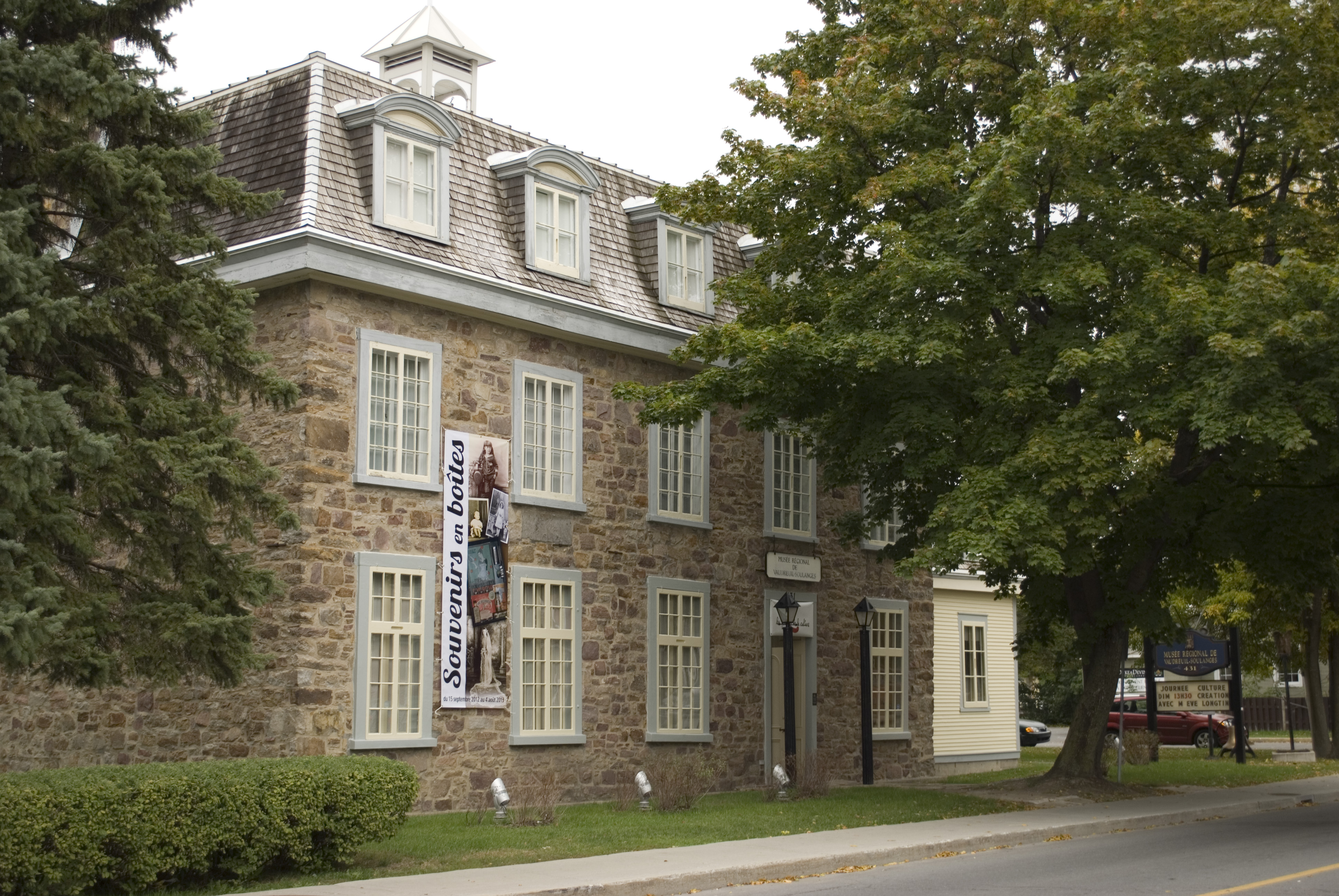 Collège Saint-Michel, 431, avenue Saint-Charles, Vaudreuil-Dorion, Québec